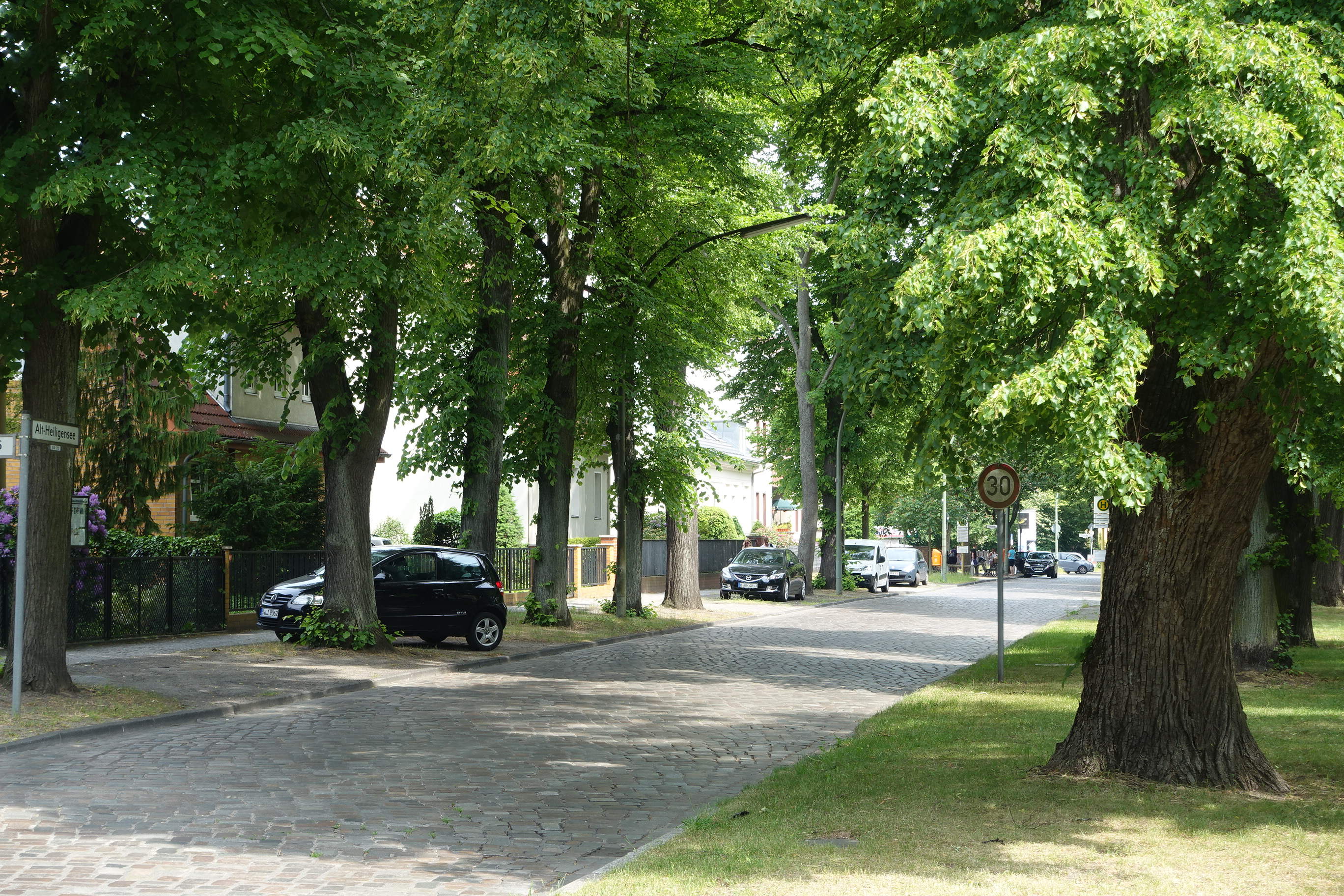 Straßenpanorama